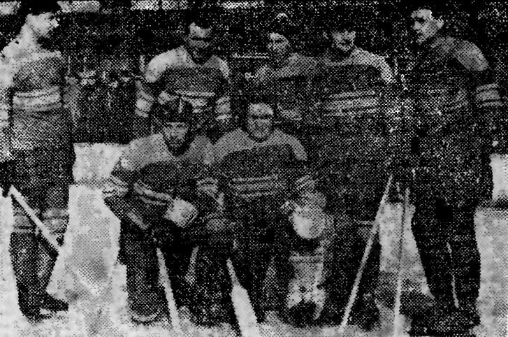 Drużyna hokejowa Sanoczanki Sanok - mistrz okręgu rzeszowskiego 1959.